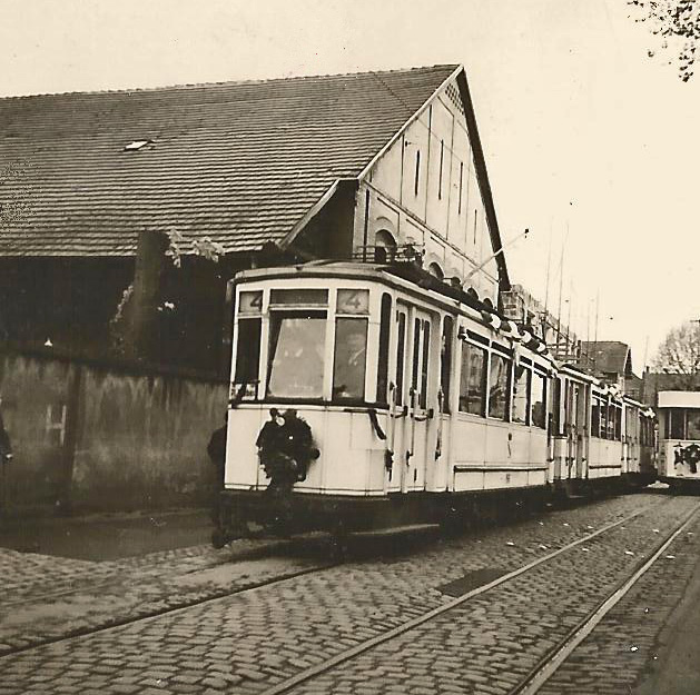 Funérailles du tramway de Strasbourg le 1er mai 1960 (photo de famille libre de droits)